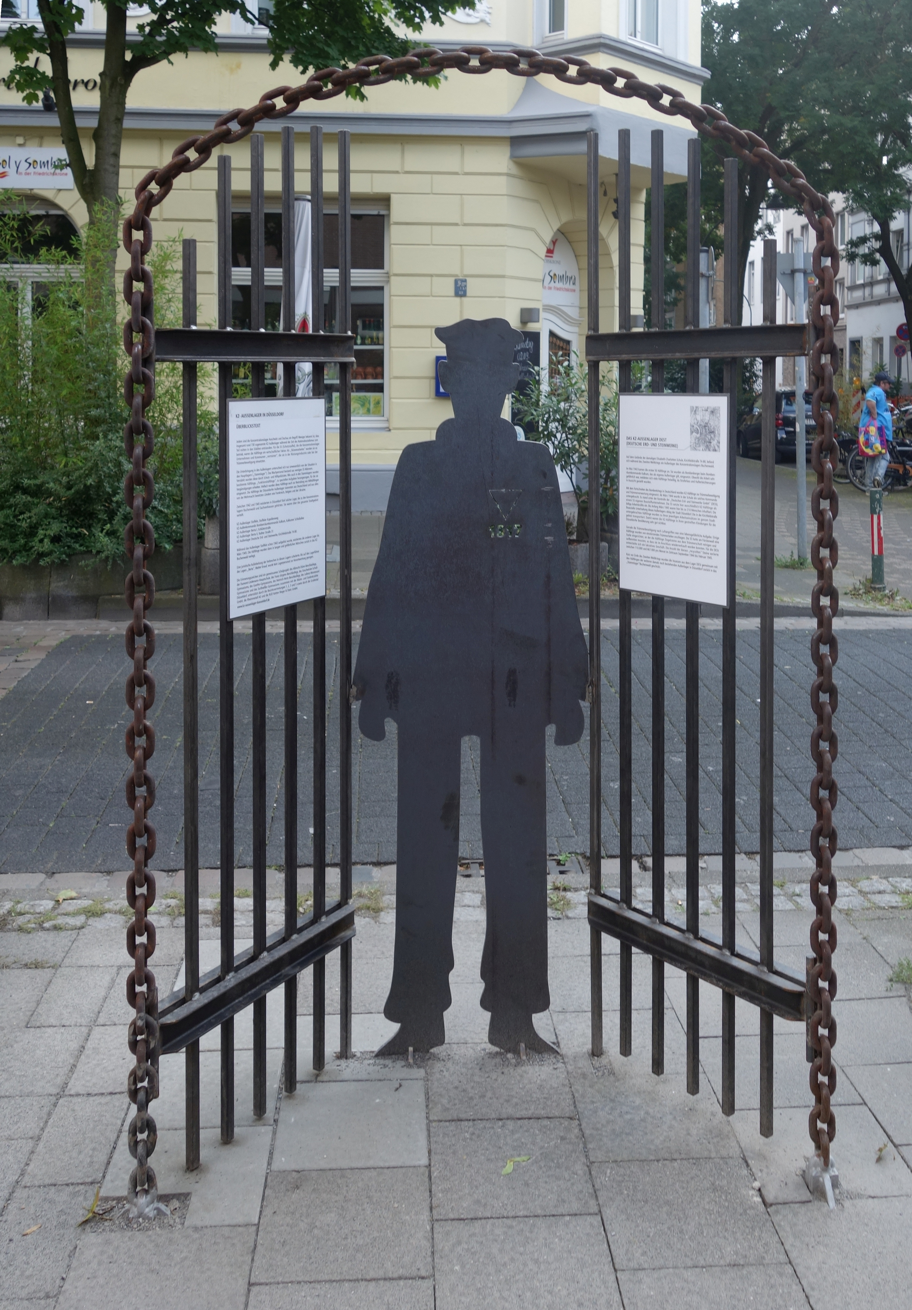 Düsseldorf, Mahnmal KZ-Außenlager Deutsche Erd- und Steinwerke (DESt), Kirchfeldstraße 74-80 (damals Elisabeth-Charlotten-Schule, heute Dumont-Lindemann-Schule).